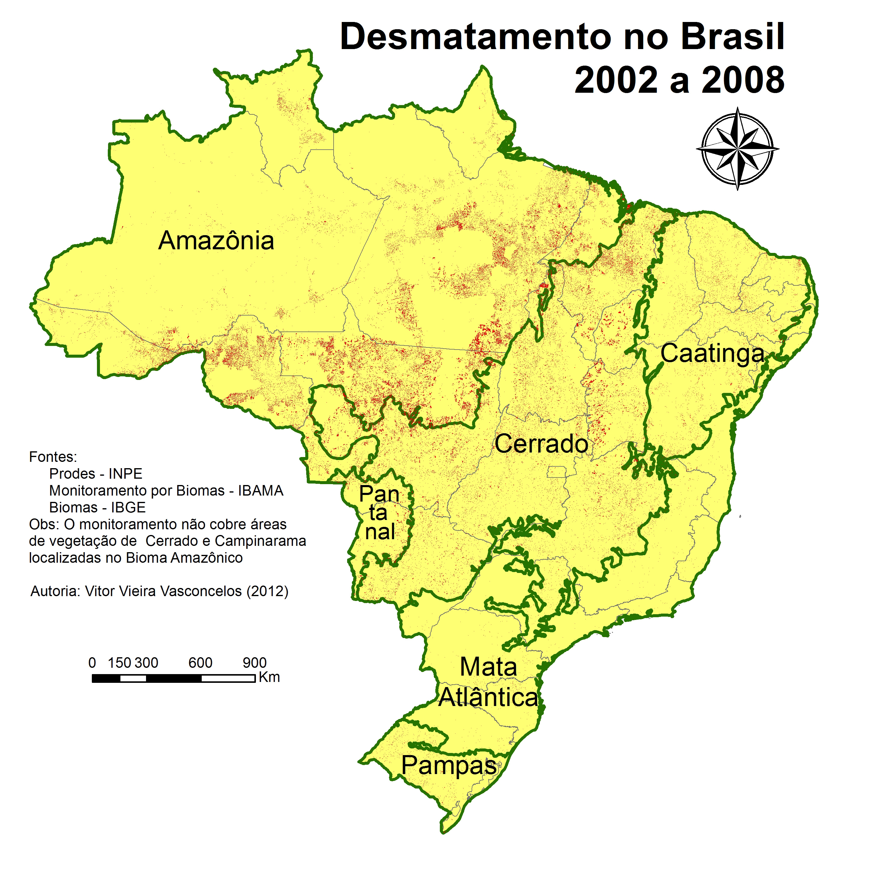 Mapa do Desmatamento no Brasil, de 2002 a 2008. Fontes: Prodes (INPE) e Monitoramento por Biomas (IBAMA). Obs: O monitoramento não cobre as áreas de vegetação de Cerrado e Campinarama localizadas no Bioma Amazônico. Autor: Vitor Vieira Vasconcelos (2012)